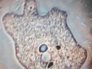 Een amoebe